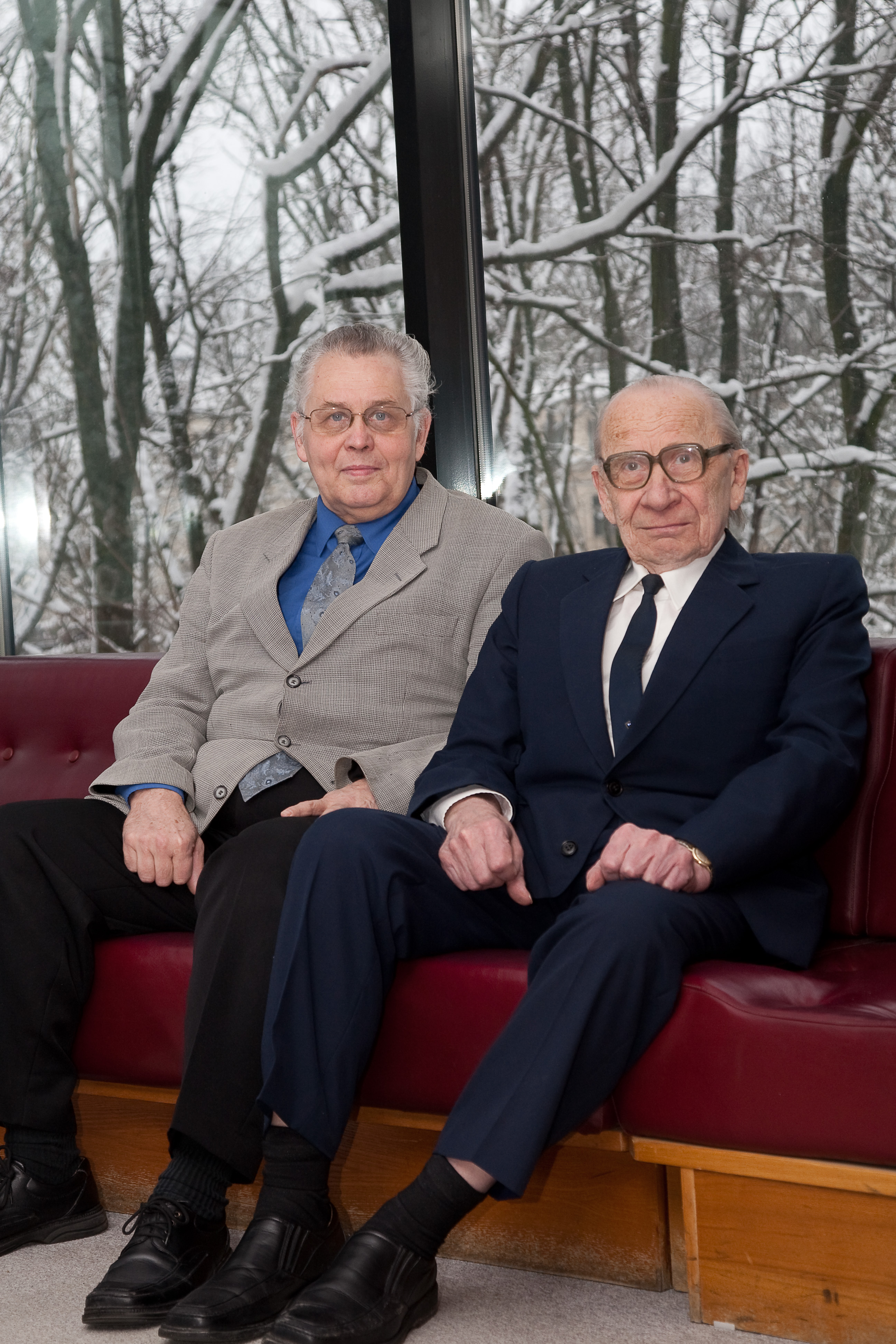 Mati Abel ja Ülo Kaasik